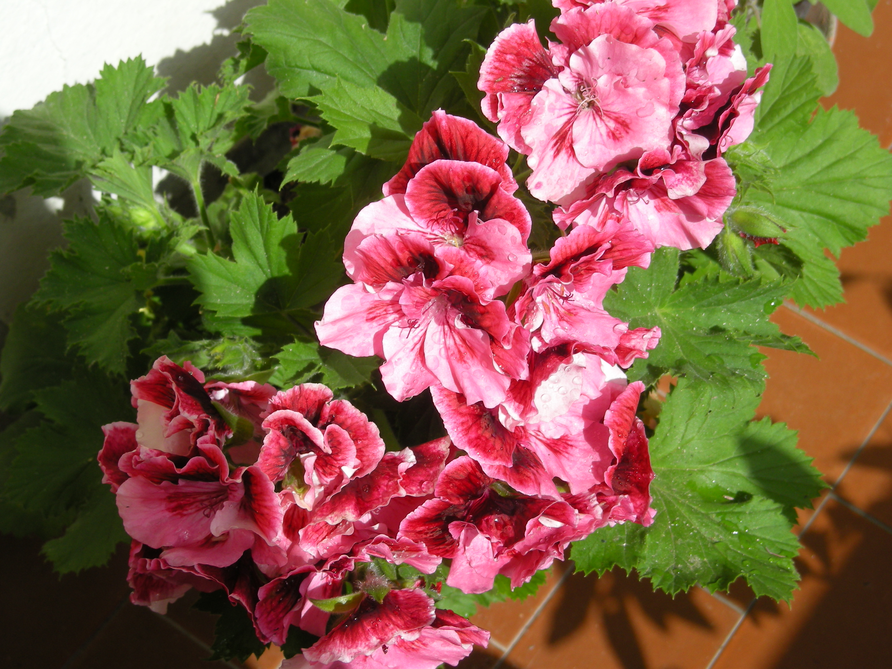 Geranio imperiale (Pelargonium grandiflorum)